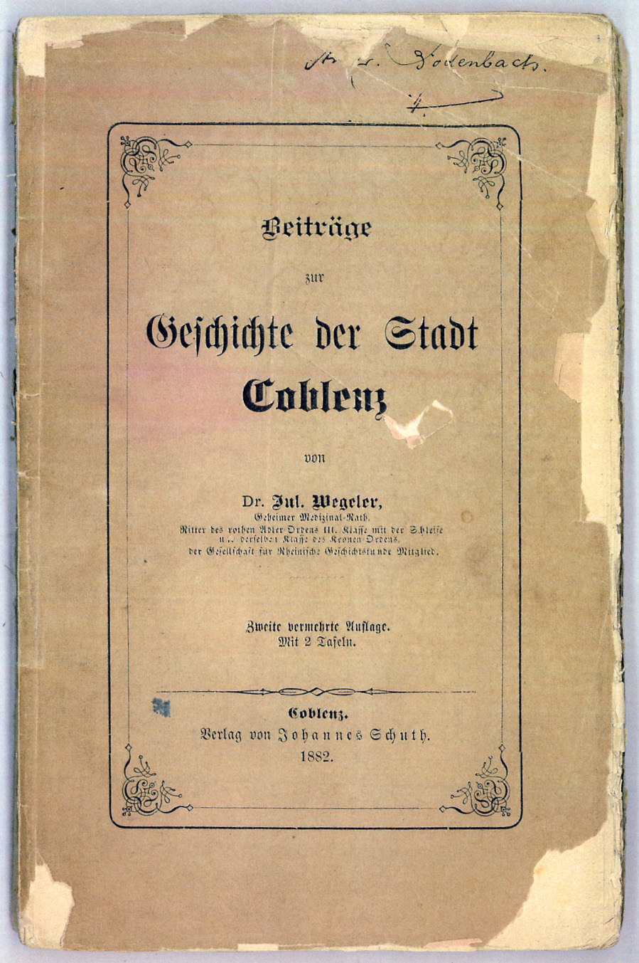 Bucheinband des Verlegers Johannes Schuth